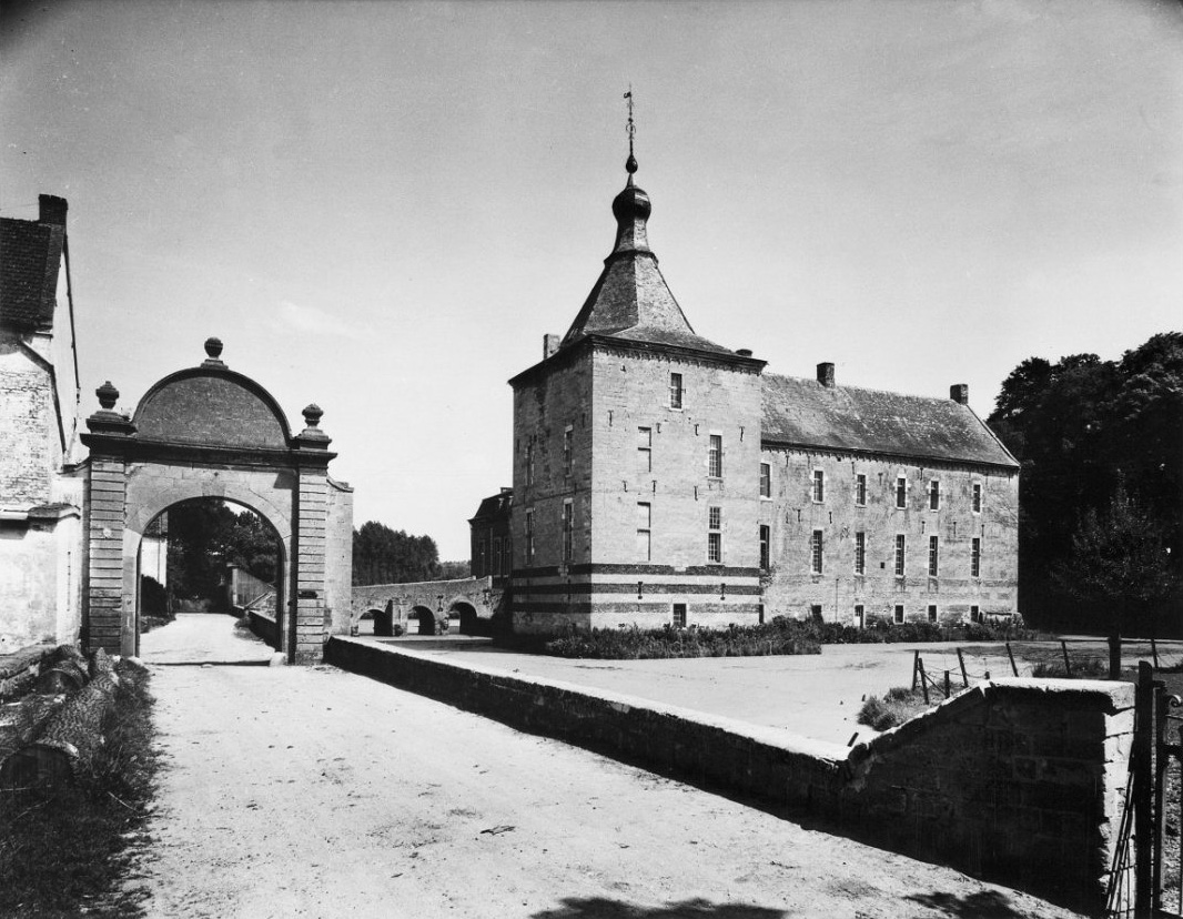 Kasteel Genhoes: zijgevel